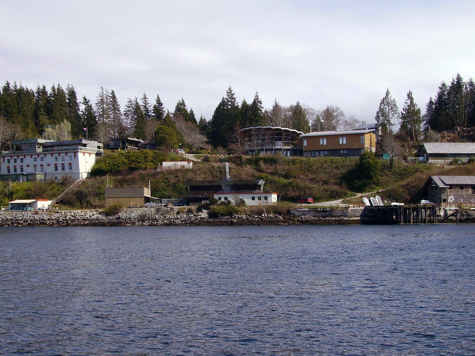 Bamfield Marine Sciences Centre